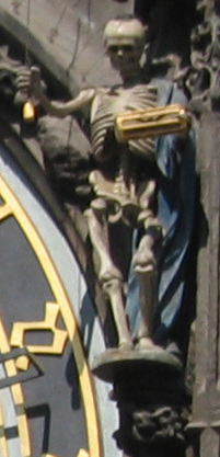 DescriÃ§Ã£o: EstÃ¡tua da morte na fachada do RelÃ³gio Orloj.; Fonte/CrÃ©ditos: Arquivo pessoal de JoÃ£o Daniel Piccino. LicenÃ§a